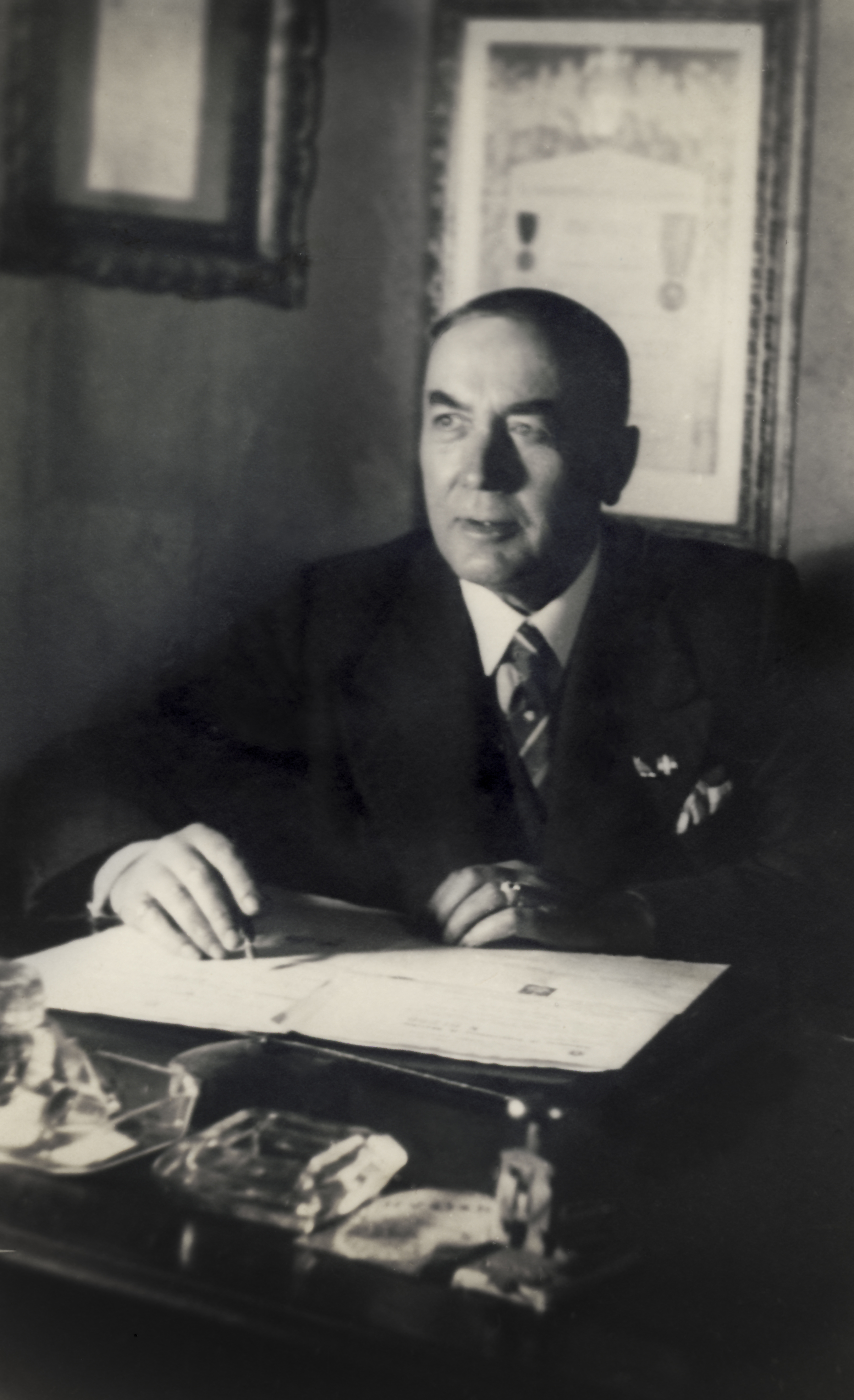 Il Detective Giuseppe Visco GIlardi anni '40.